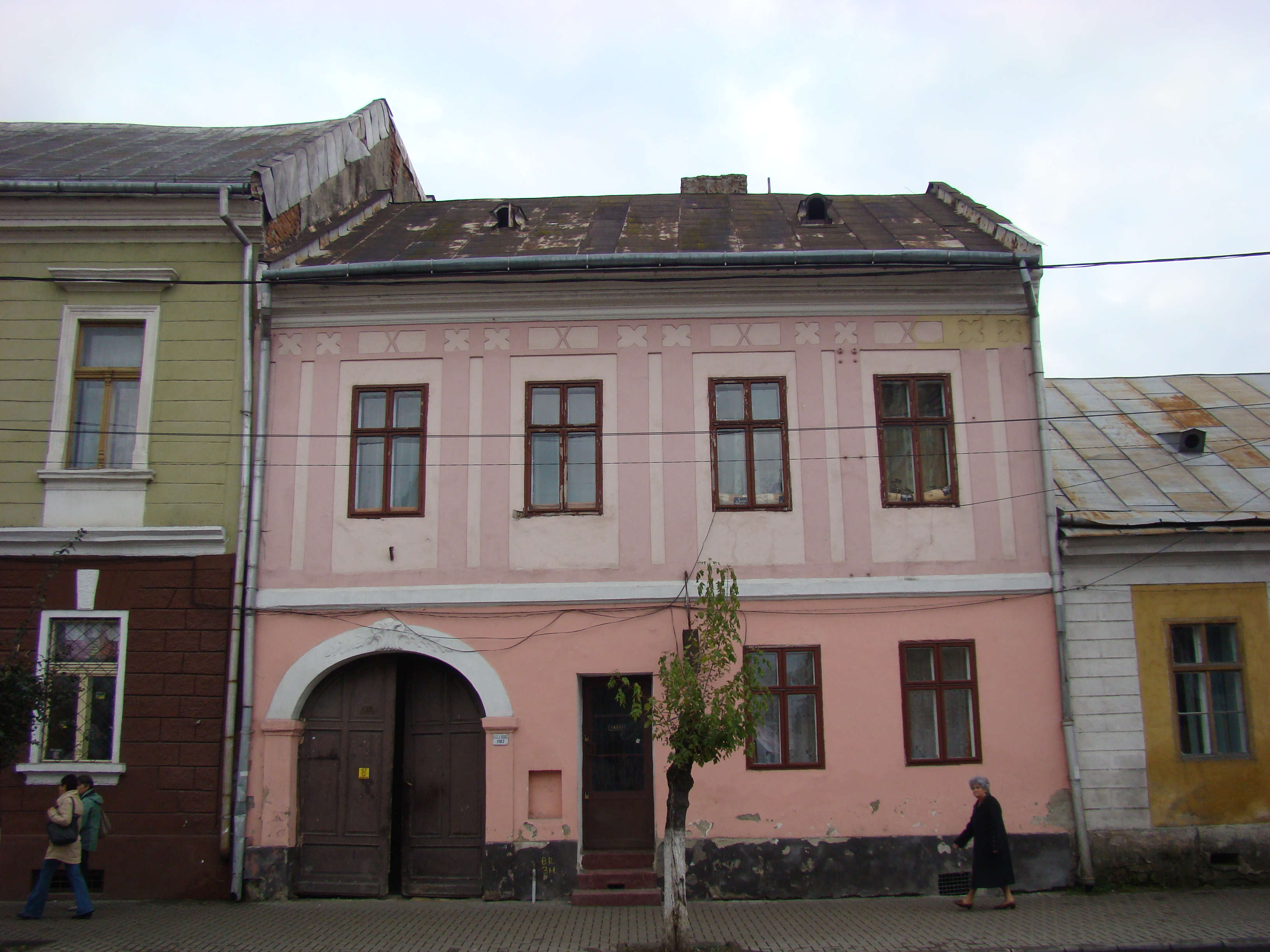 Casă, municipiul Sighetu Marmației, Str. Mihaly Ioan de Apșa 21